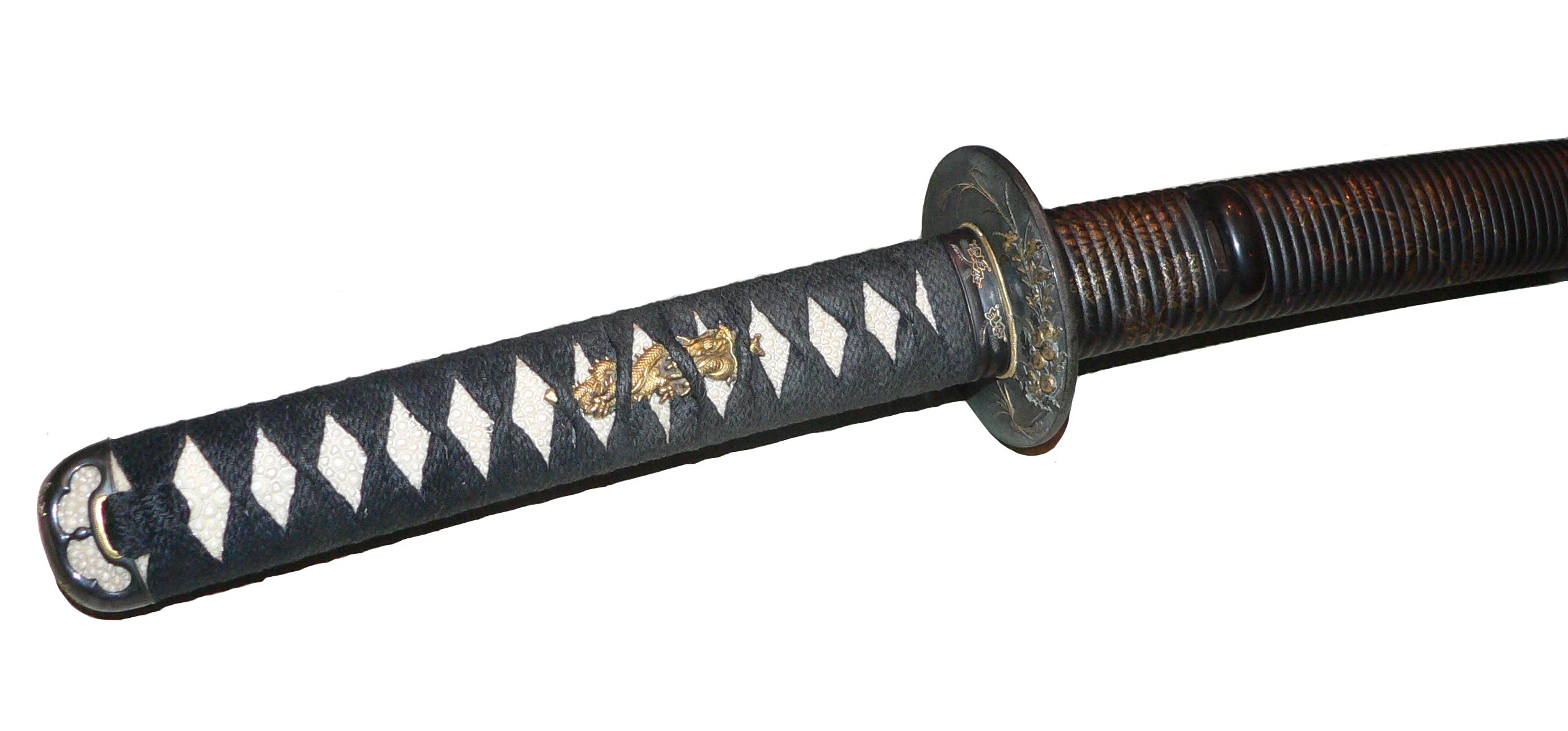 tsuka d'un katana offert à un ambassadeur, XIXe siècle.